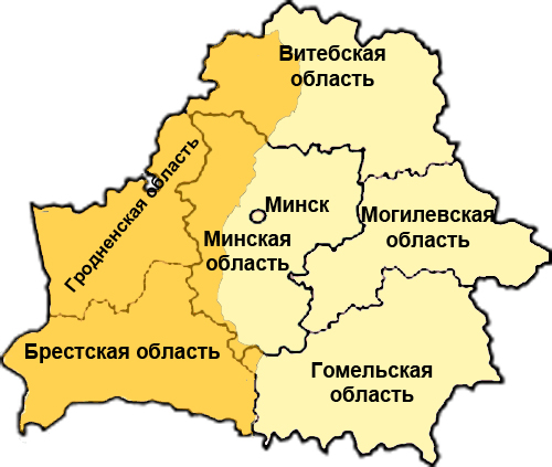 Зап. Белоруссия и совр. адм. деление